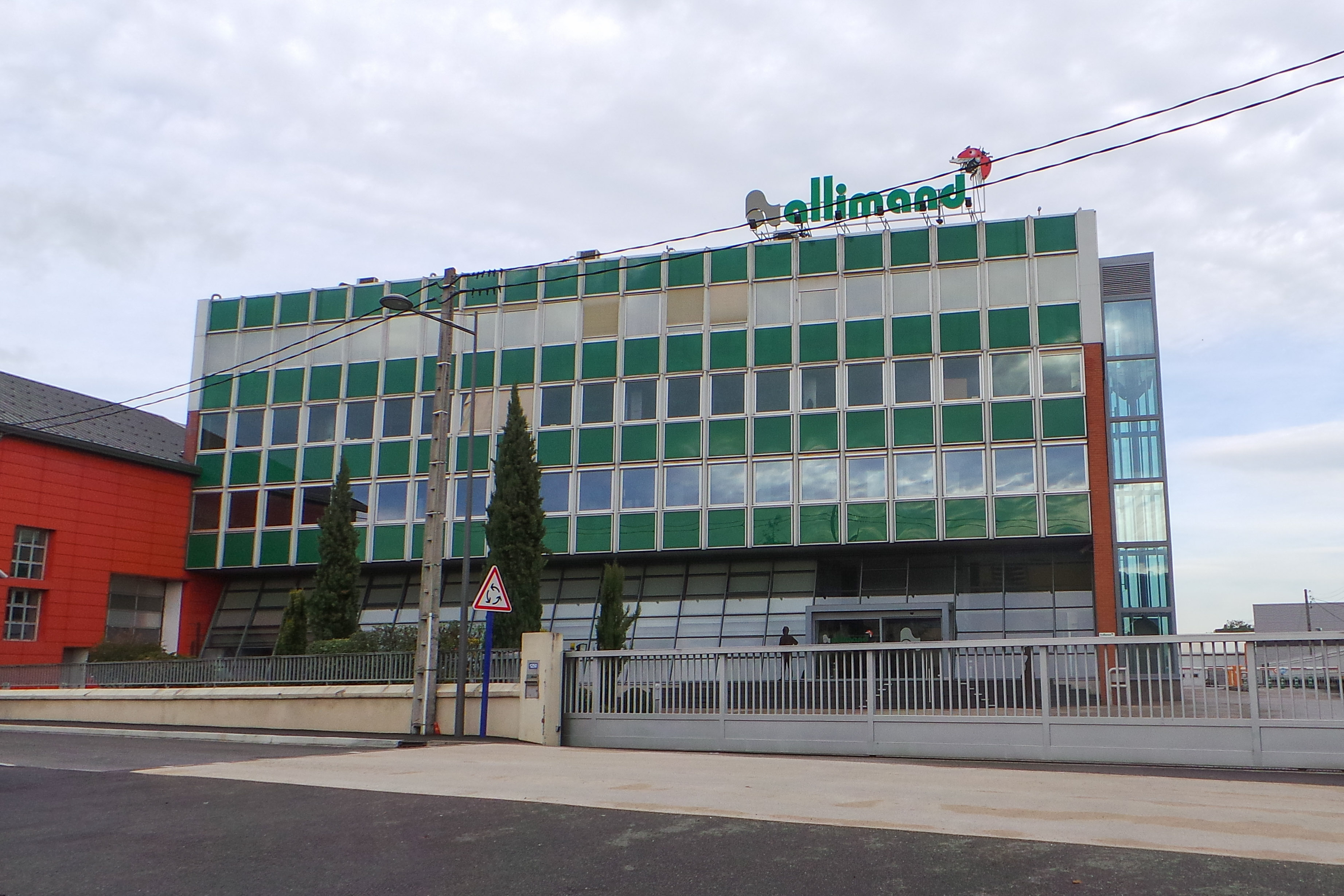 Usine Allimand de Rives / Rives, Isère, France